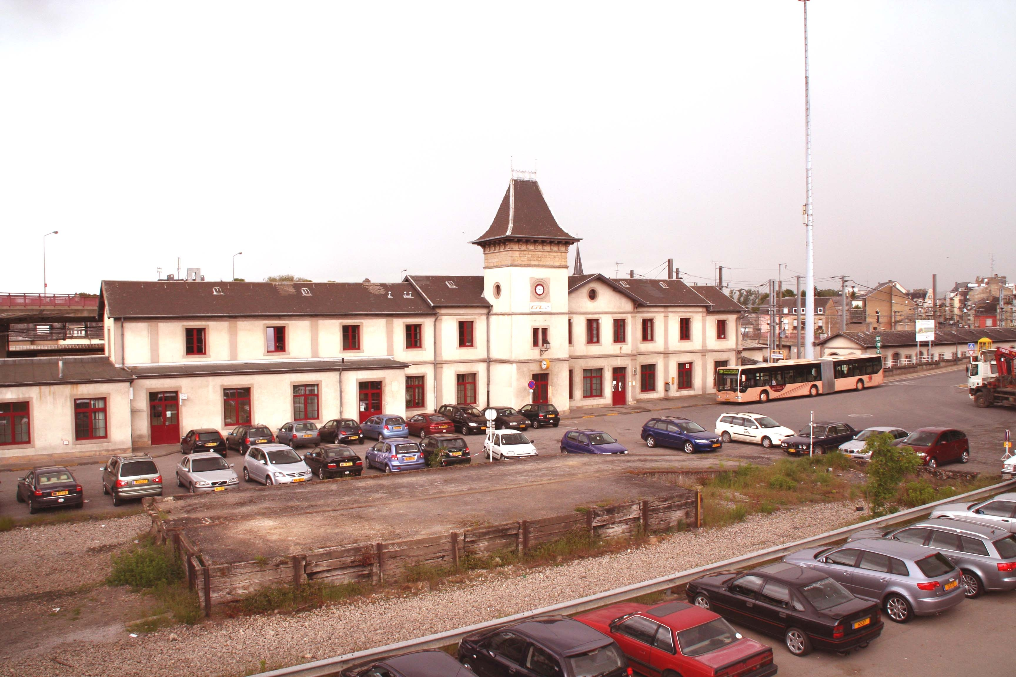 Gare BeetebuergL